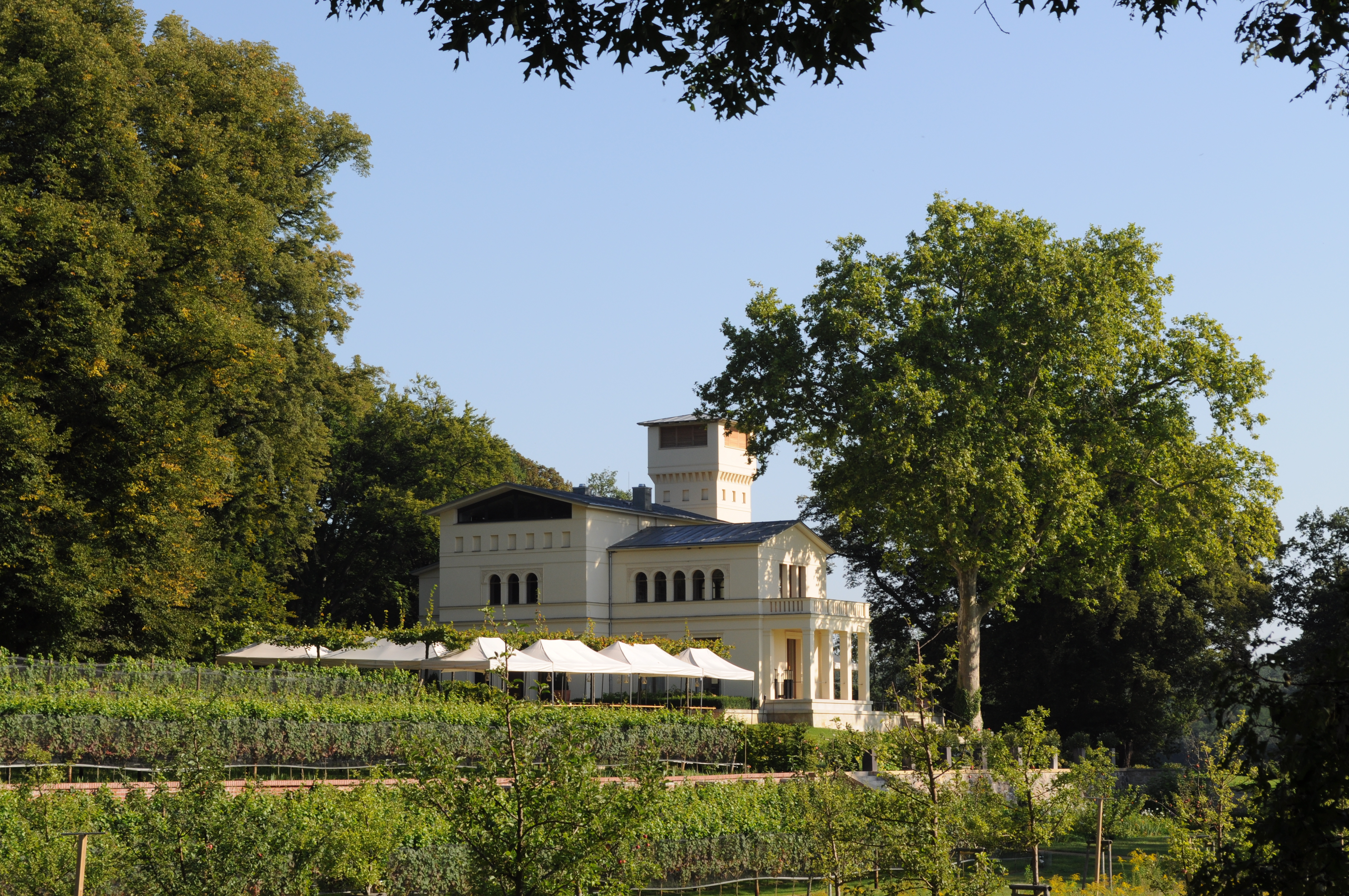 Villa Jacobs, Potsdam, Bertinistraße, 2012